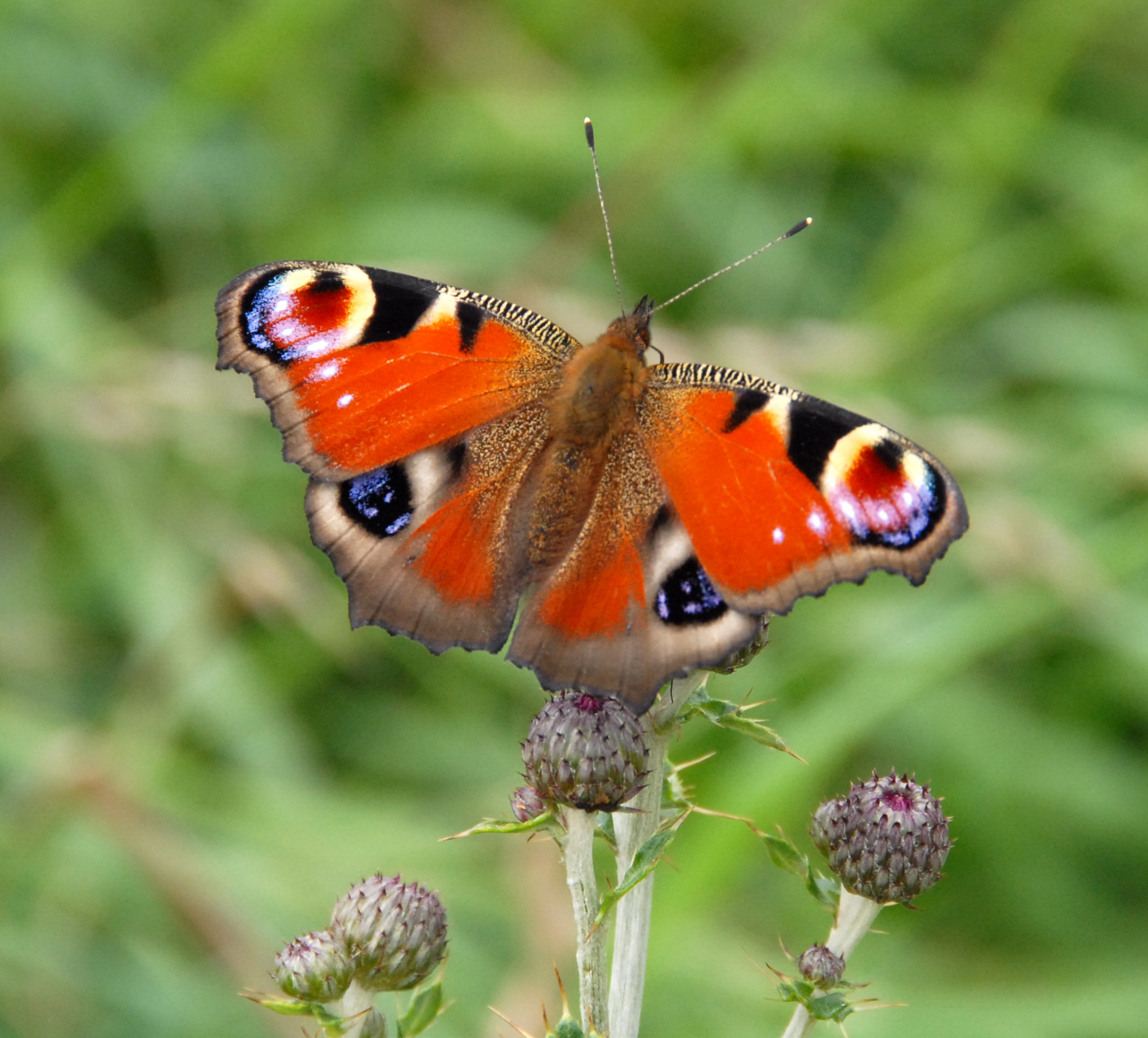 Päiperléck (Lëtzebuerg / Lampech). Kategorie:Päiperleken